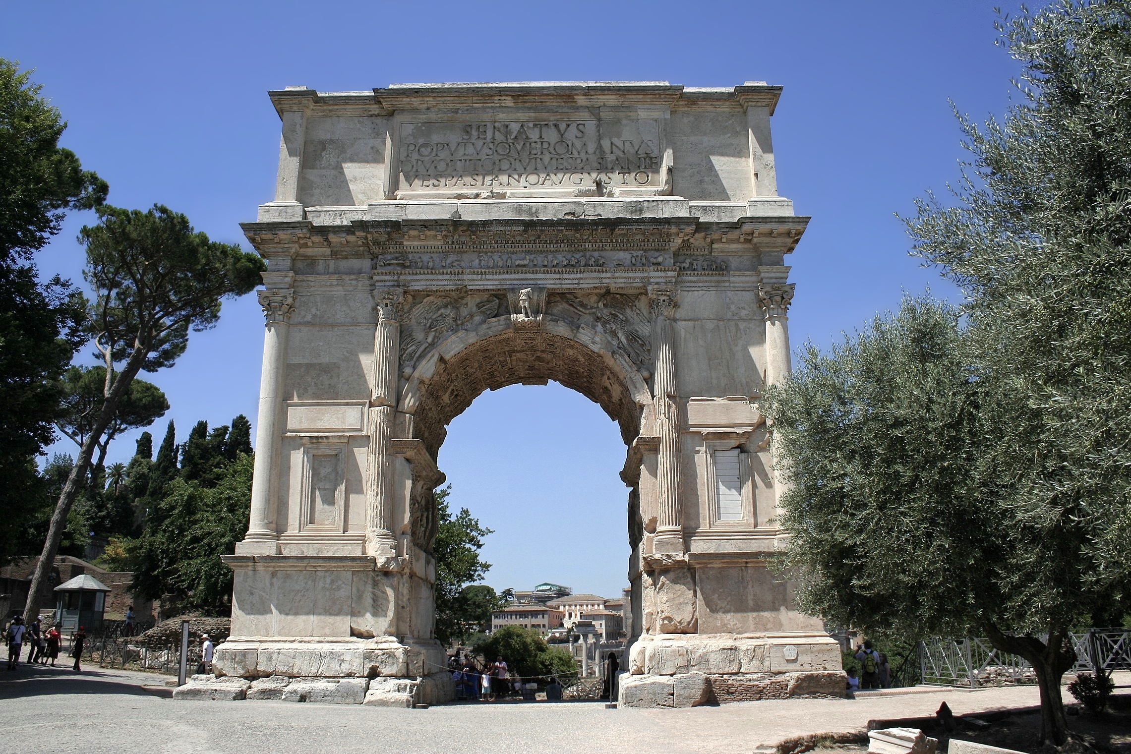 Arc de Titus, face orientale.